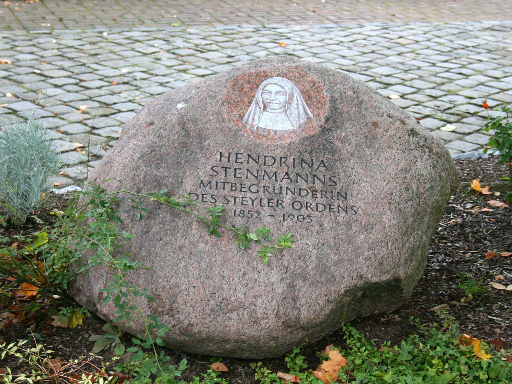 Issum, Innenstadt